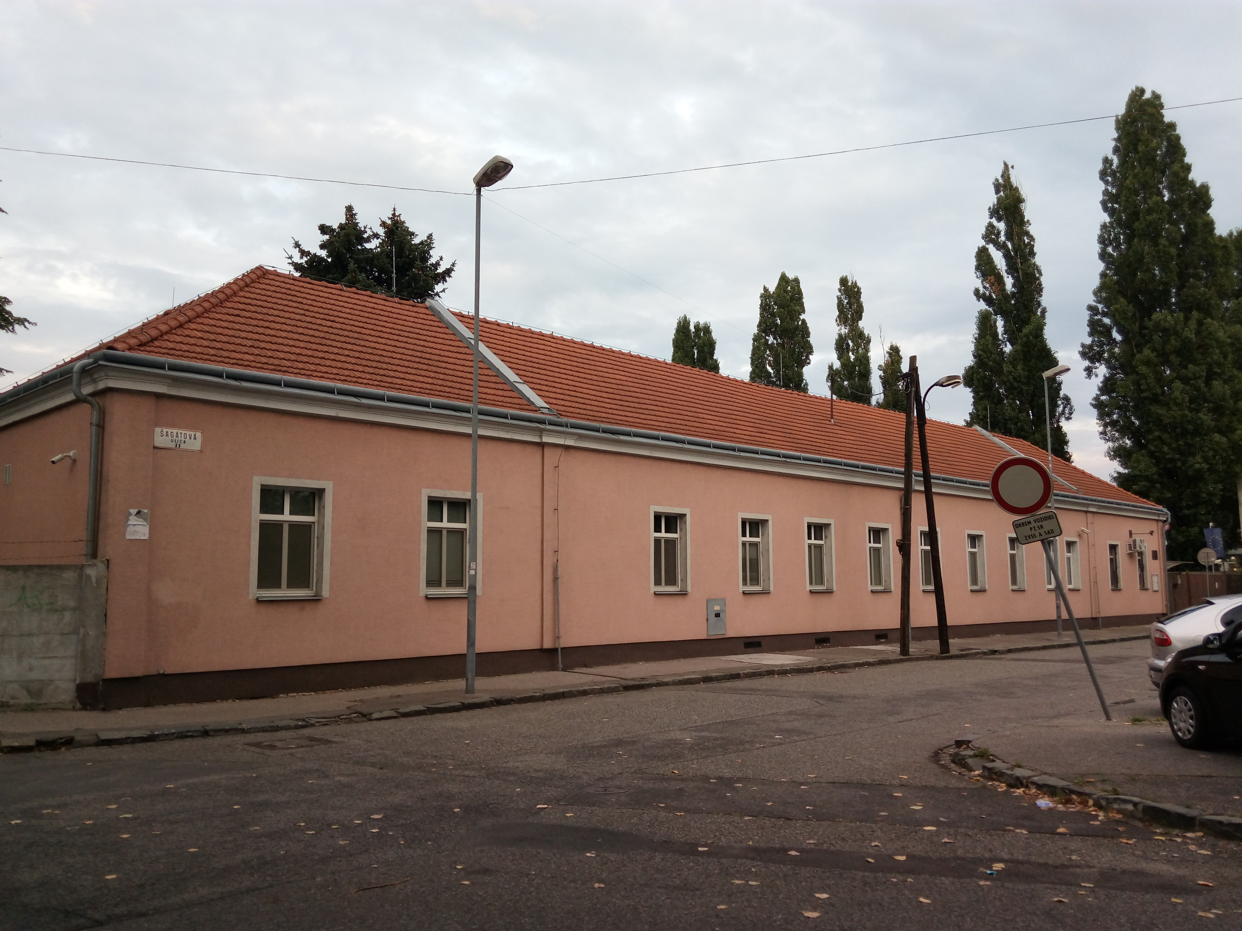 Šagátova, Ružinov, Bratislava